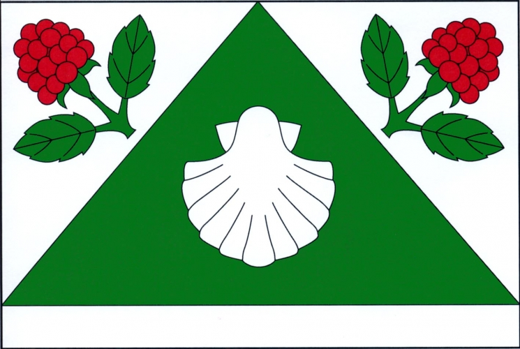 Malenice (okres Strakonice)